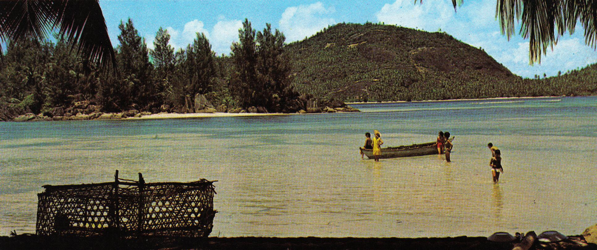 Port Glaud, Mahe, Seychelles